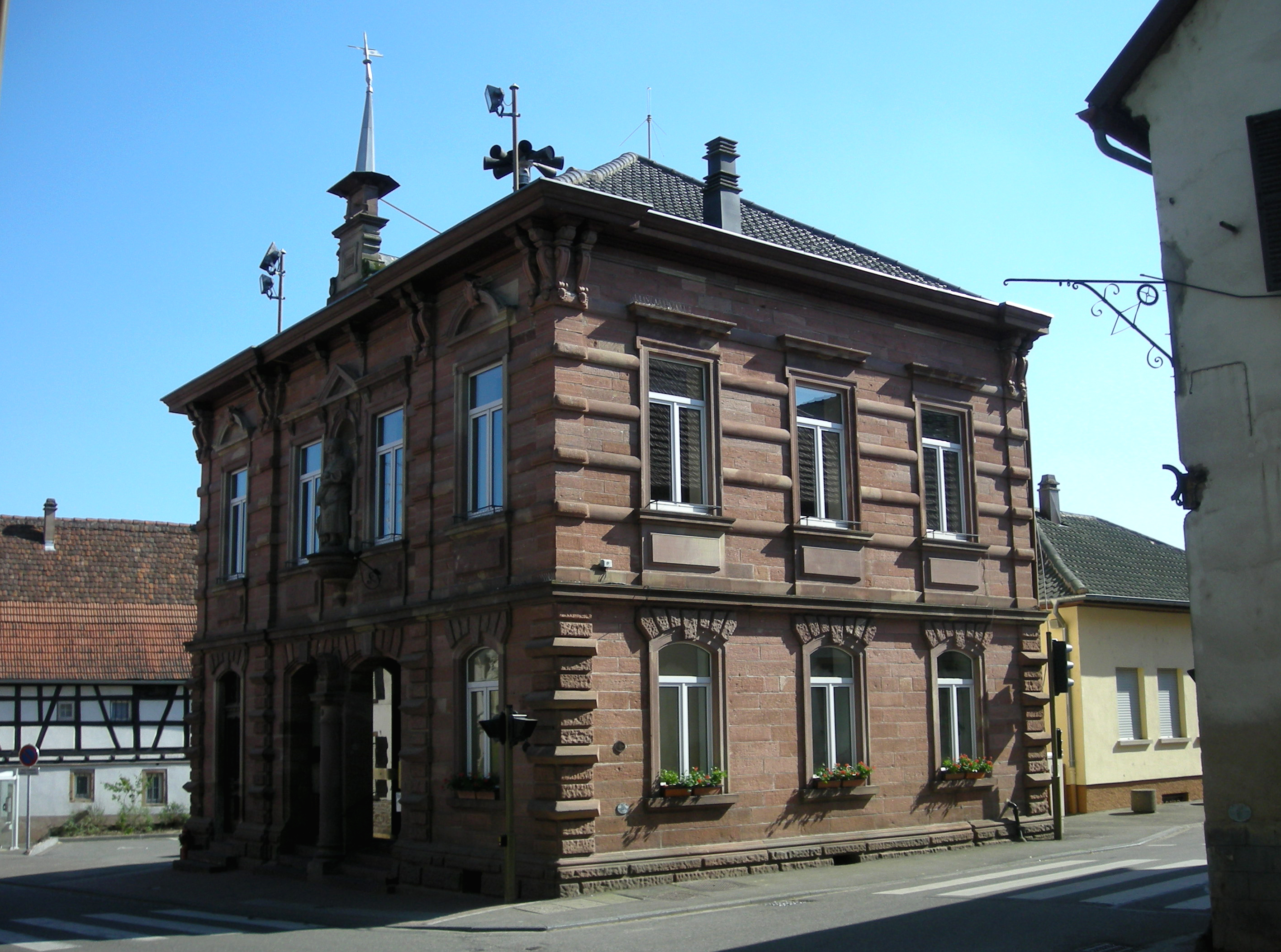 Mairie de Still (Bas-Rhin)